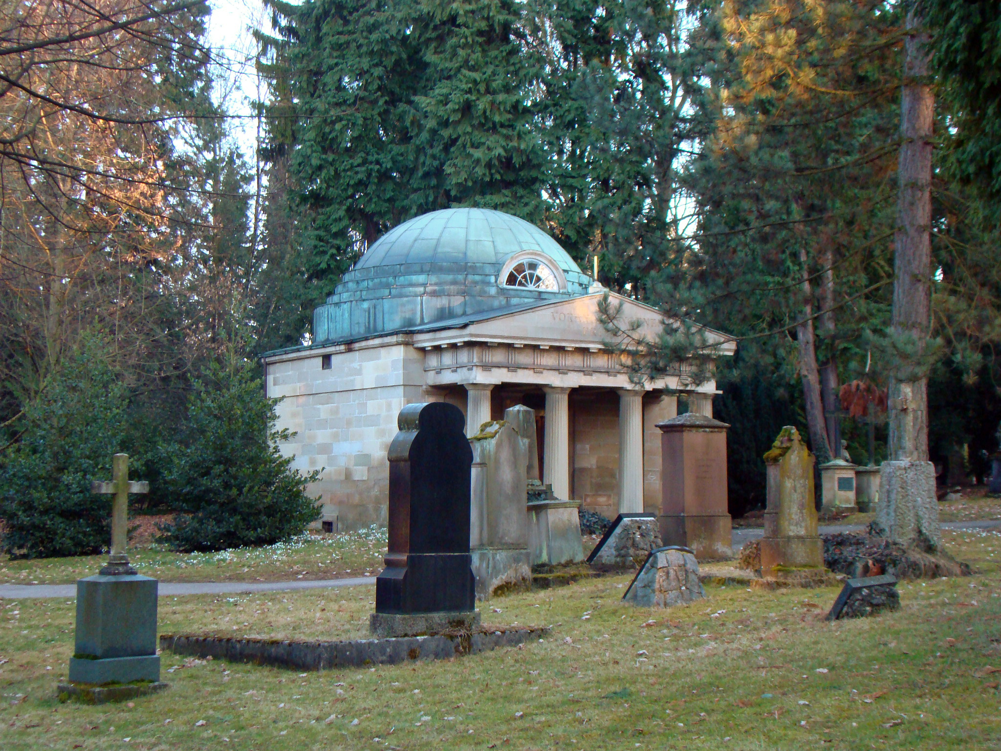 Alter Friedhof in Ludwigsburg, Hist. Grabmale und Zeppelin-Mauseoleum